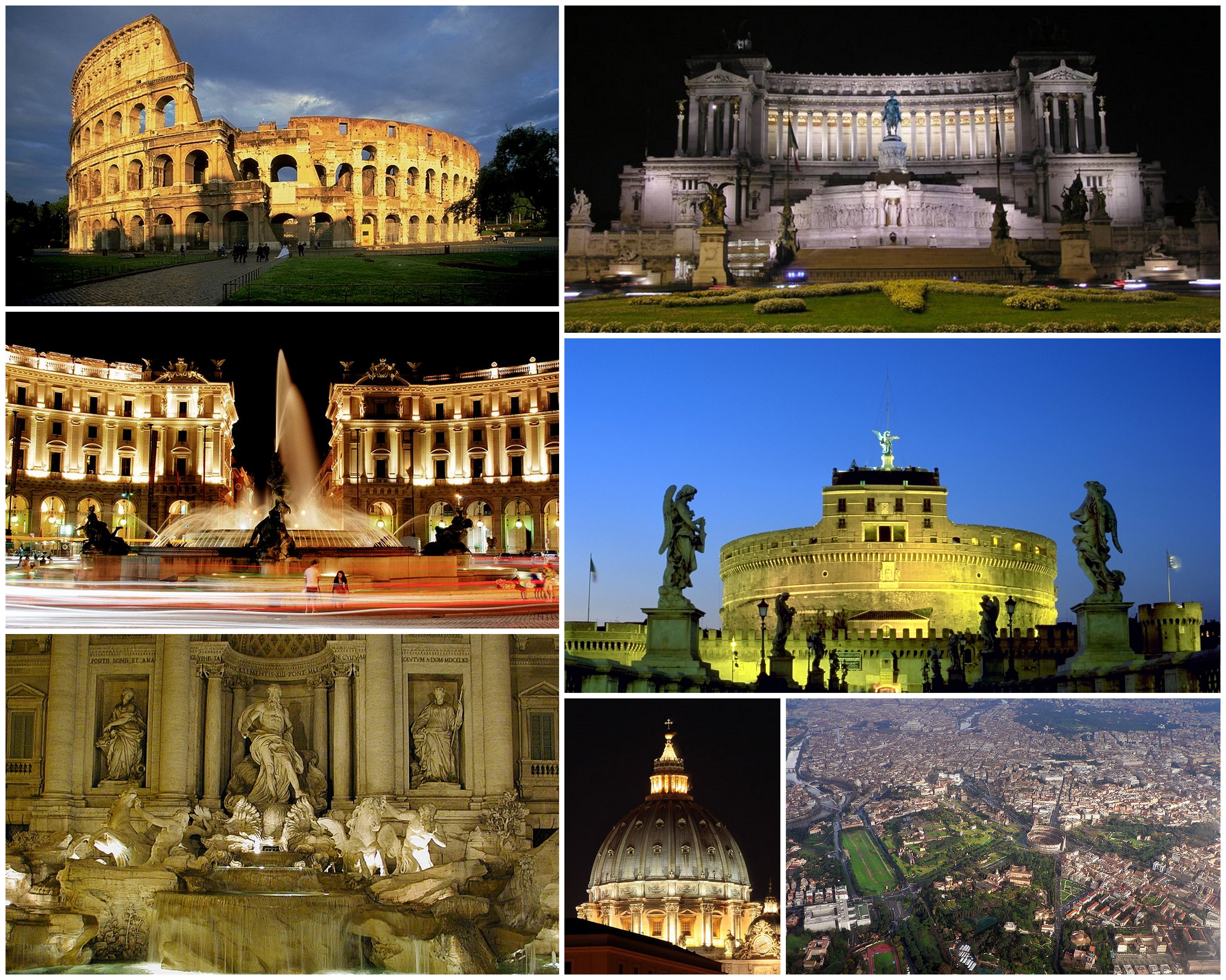 Collage di vari immagini di Roma.